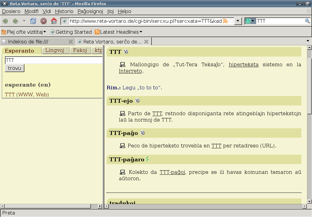 Mozilla Firefox 3.0.4 en Esperanto, montranta paĝon el la Reta Vortaro, je Debian GNU/Linux kun Xfce 4 kun la interfaca etoso “Raleigh” kaj la titola stilo “Therapy”.